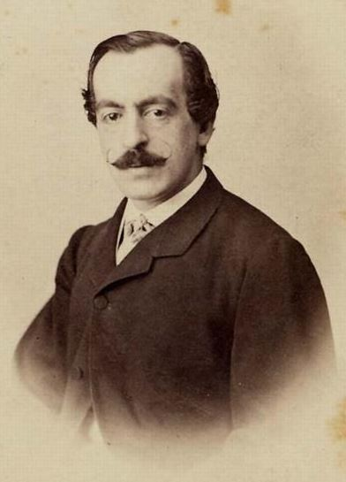 Domingo Arteaga Alemparte (Concepción, 1835 - Santiago, 1880), periodista, poeta y político chileno.